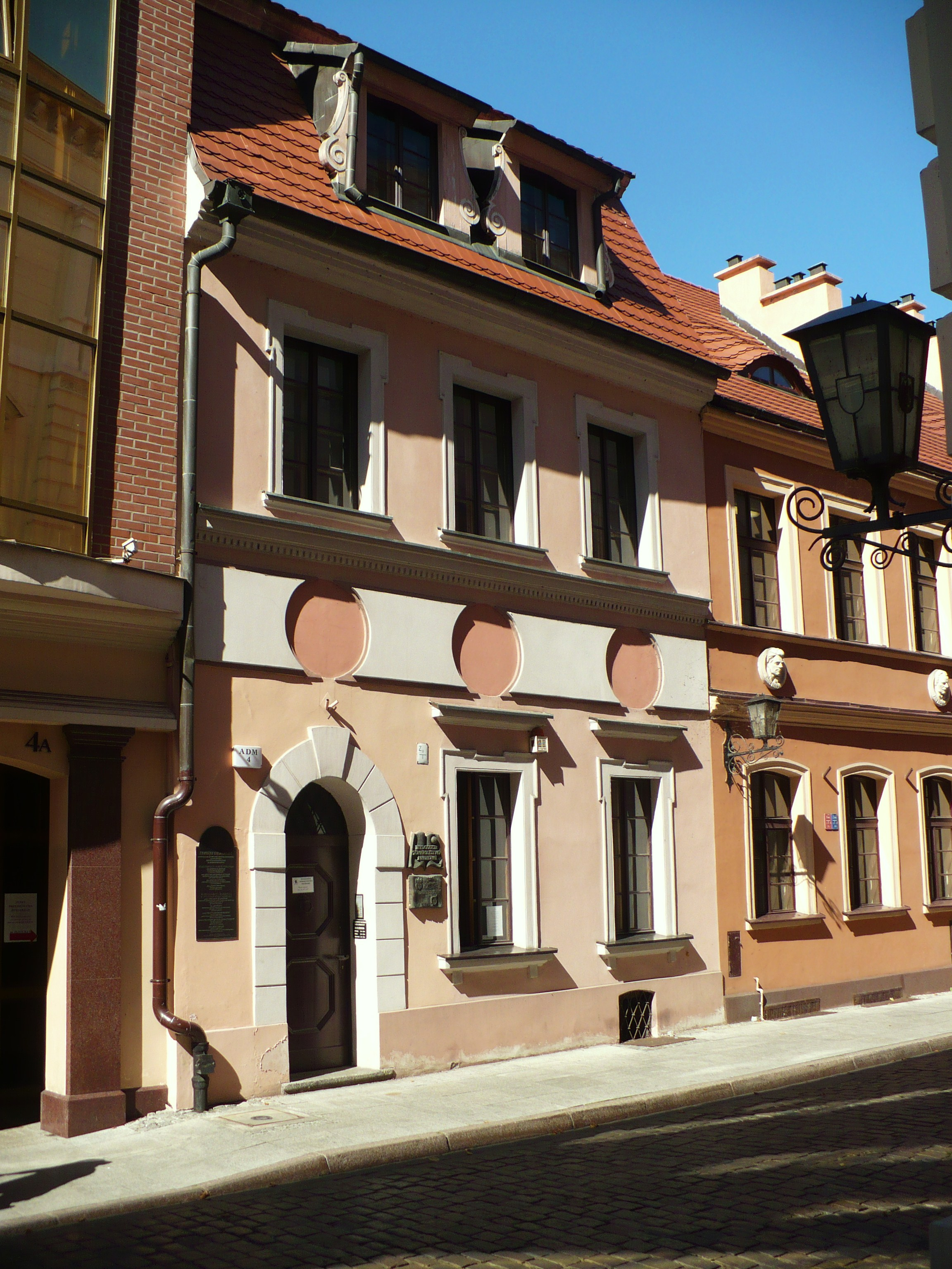 Bydgoszcz, dom, ok. 1775